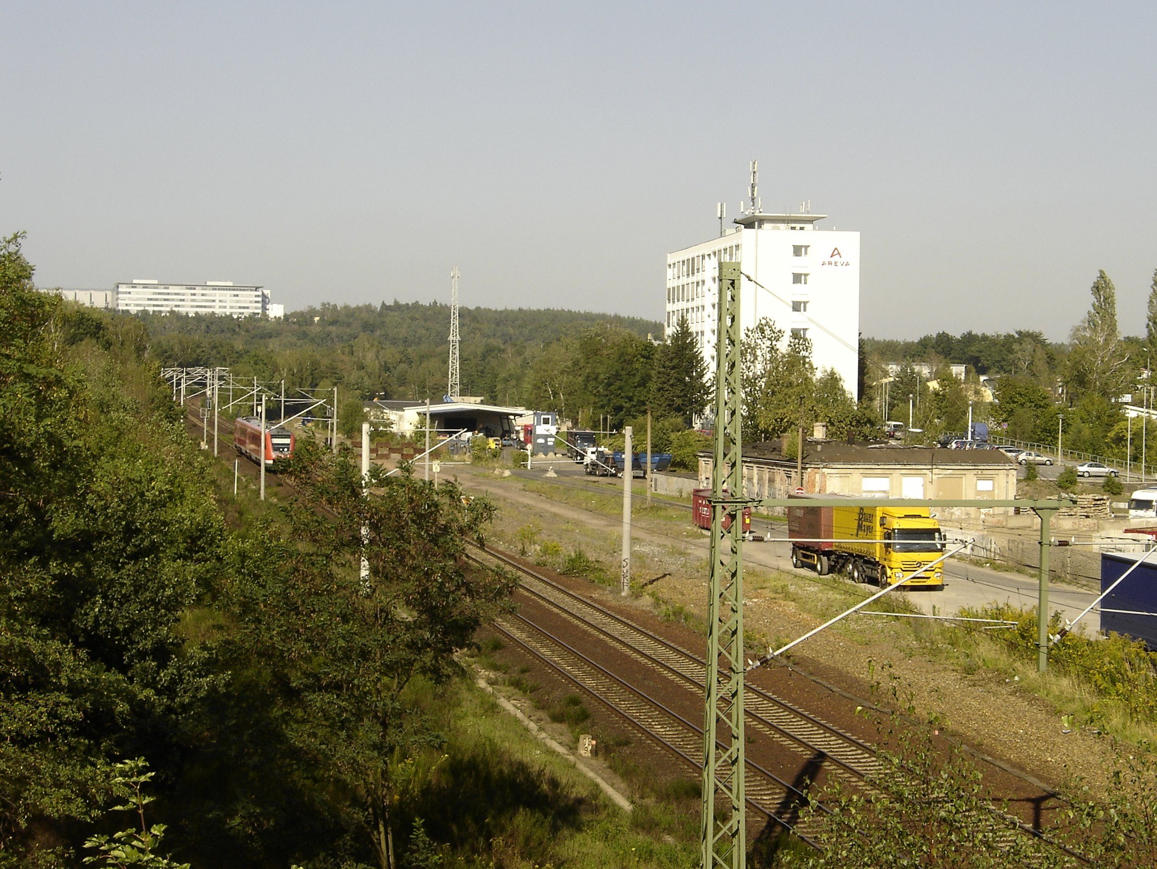 Bahnstrecke Görlitz–Dresden (ehemals „Sächsisch-Schlesische Eisenbahn“) in Dresden-Albertstadt. Blick Richtung Norden, Strecke Richtung Görlitz. Östlich davon (im Bild rechts neben der Bahnstrecke) ist noch das Planum der ehemaligen Industriebahn Albertstadt zu sehen.